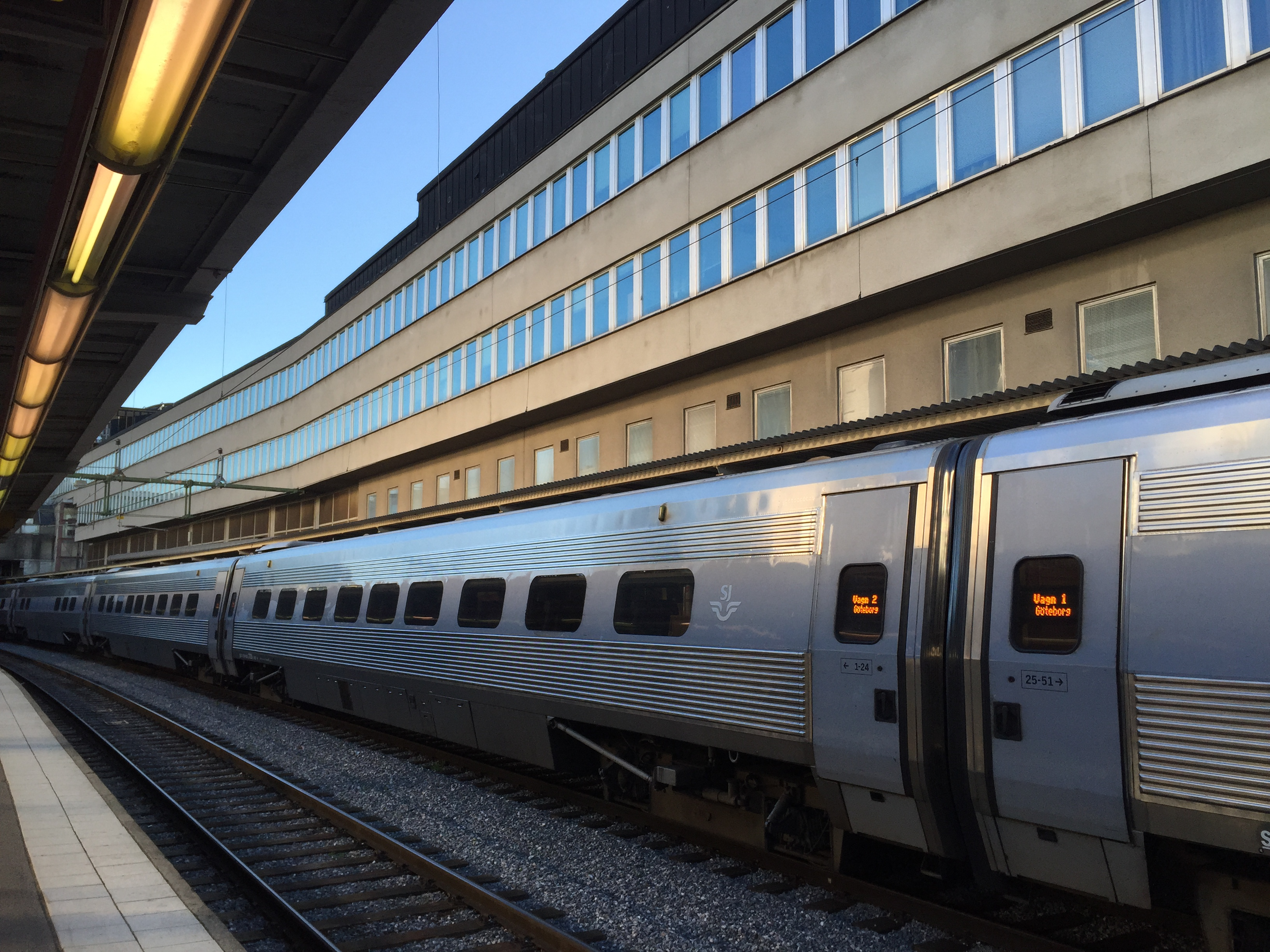 Spår 10 & 11, Stockholms Central